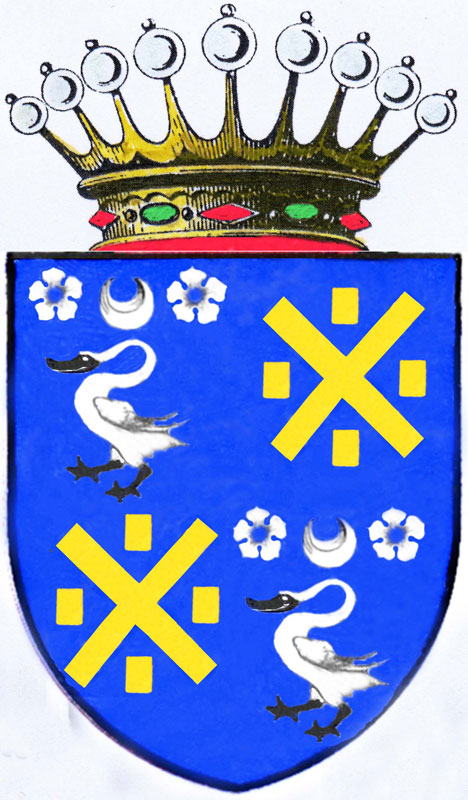 Blason-theophile-bb